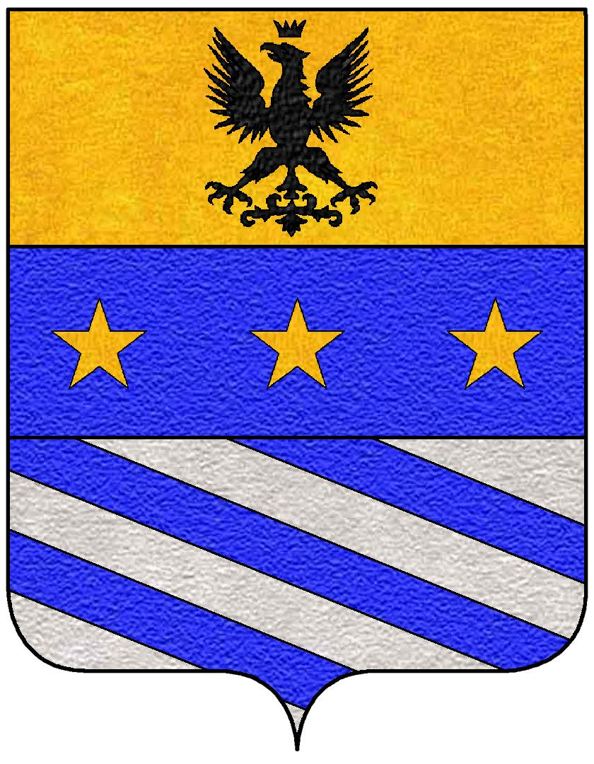 Stemma della famiglia Arrigone